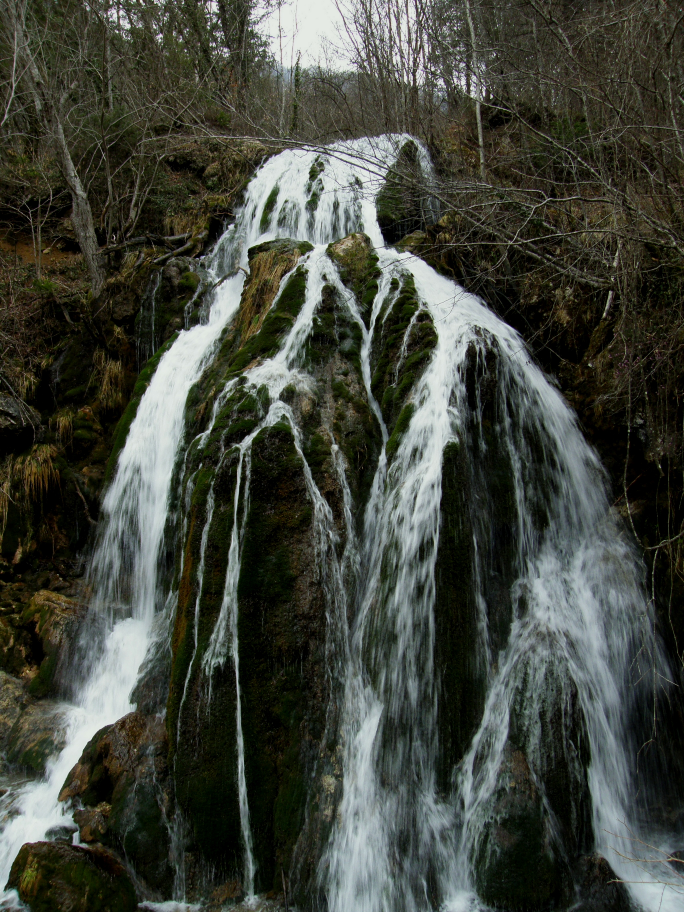 Waterfall Nežica in Slovenia